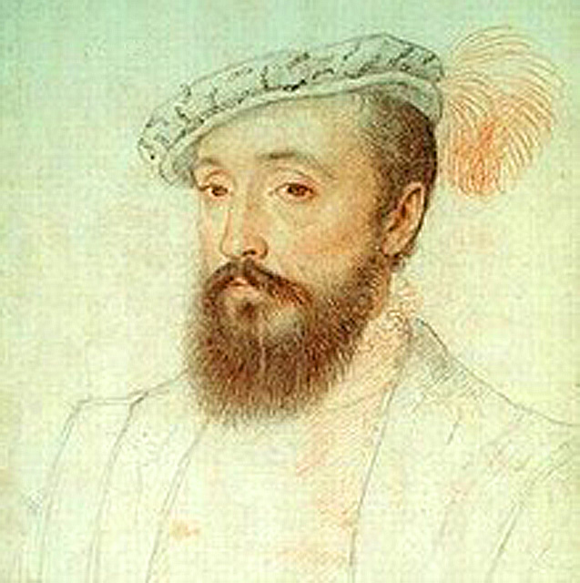 Bertrand Raimbaud de Simiane